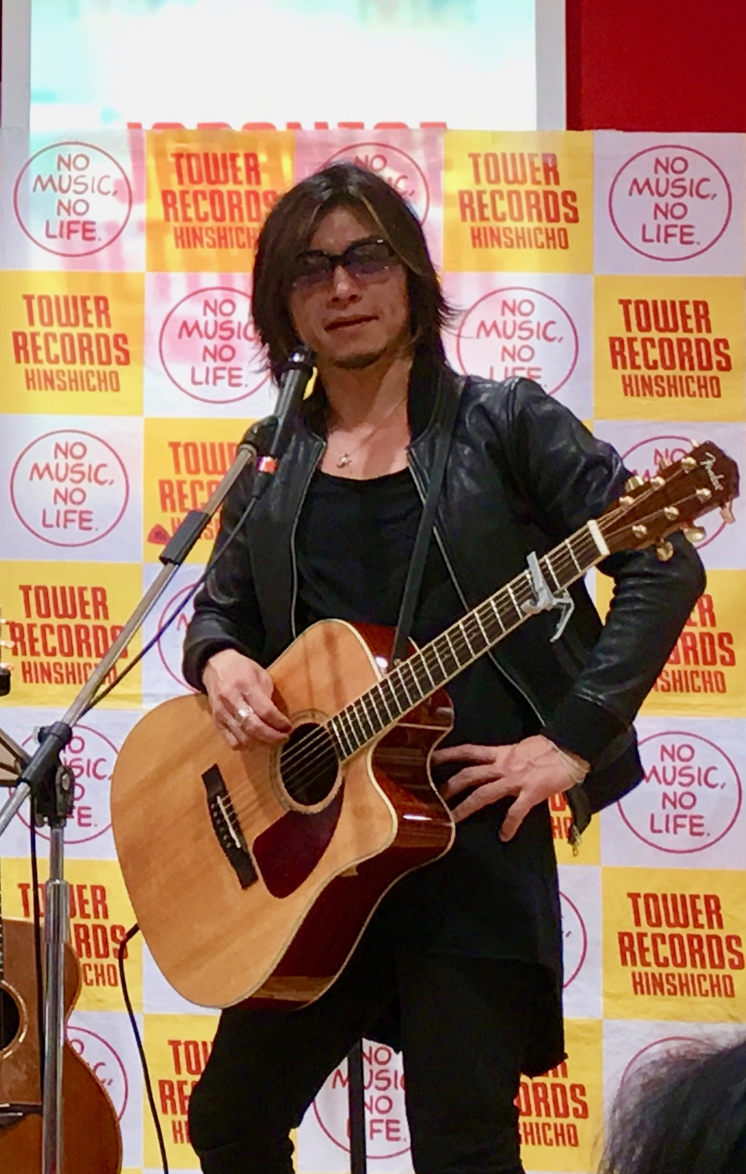 村田有希生。2018年2月1日、タワーレコード錦糸町店インストアフリーライブにて撮影。